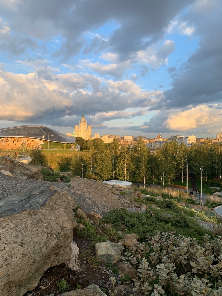 Парк Зарядье, 2019 год